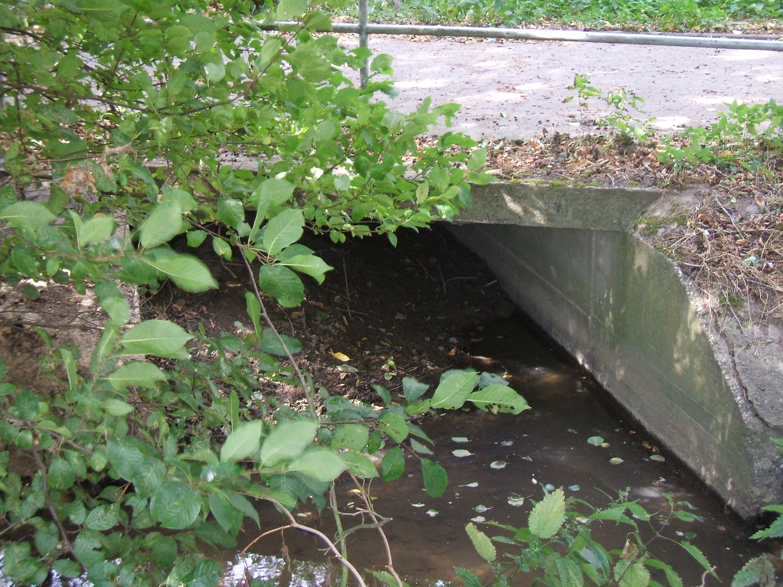 Der meist trockene Weilerwiesengraben unter einer Balkenbrücke des Äppelwoiwegs mündet von links in den Seebach